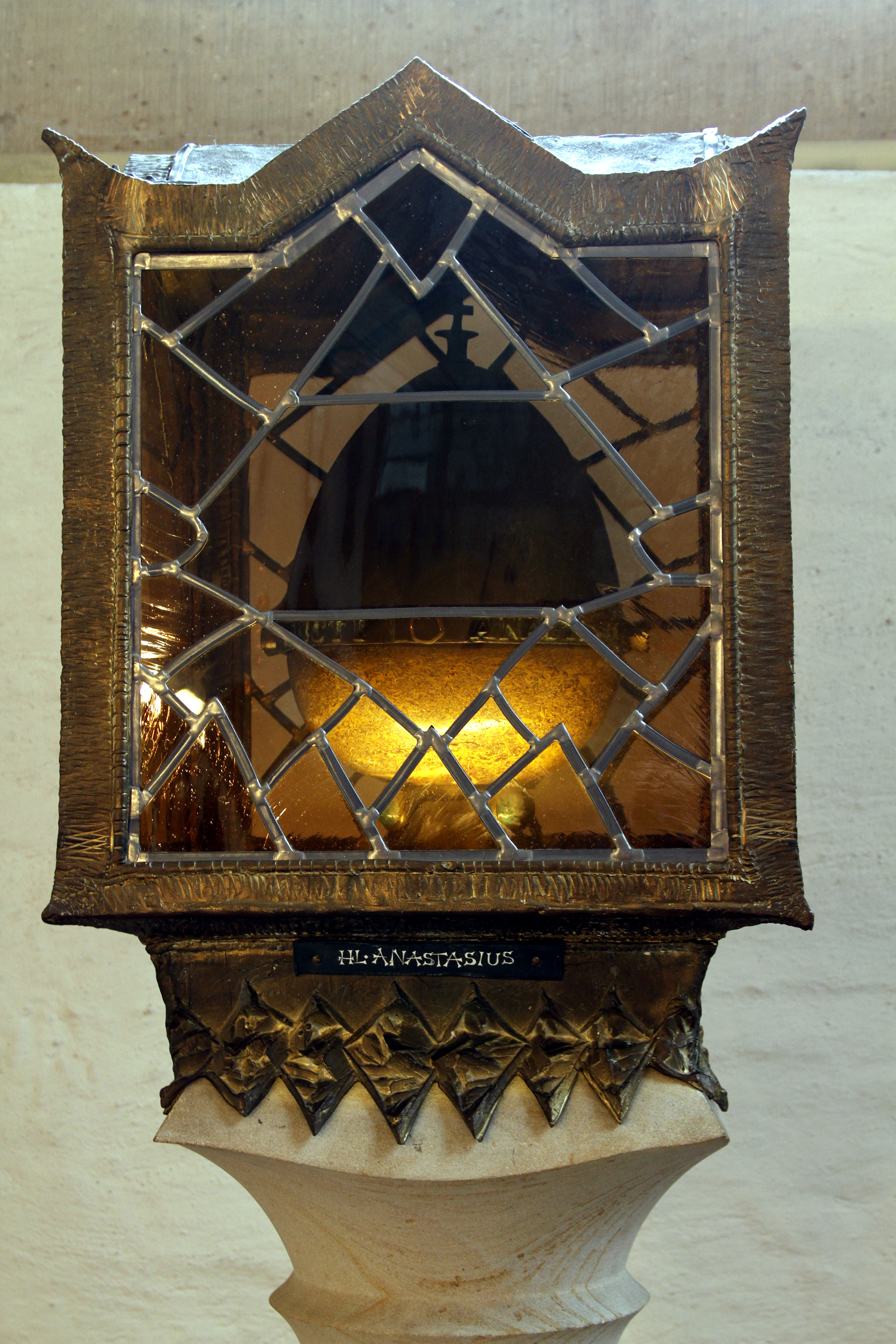 Speyer Cathedral - Speyer - Germany